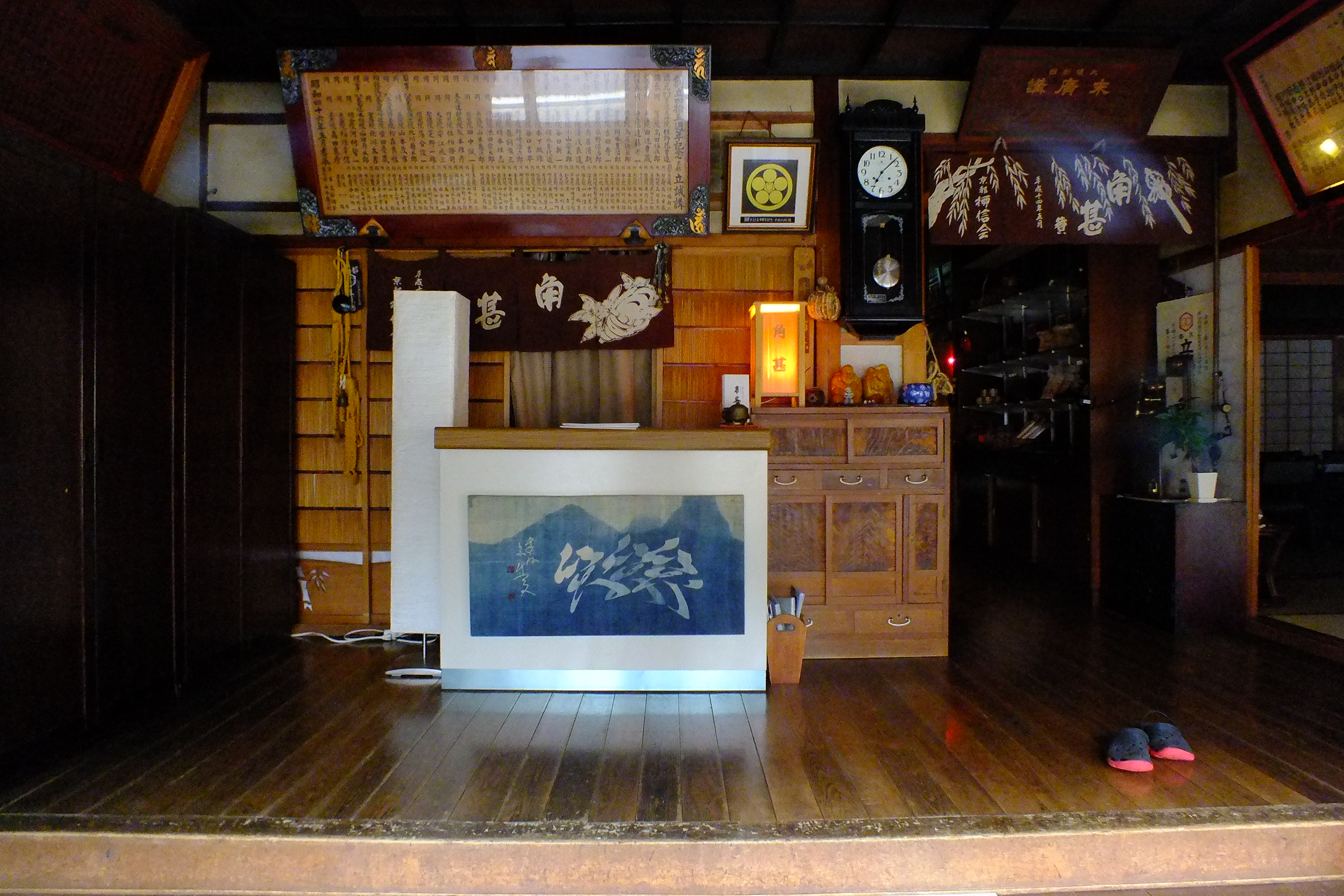 2016-09-09 Dorogawa-Onsen, Tenkawa, Nara,洞川温泉 帳場